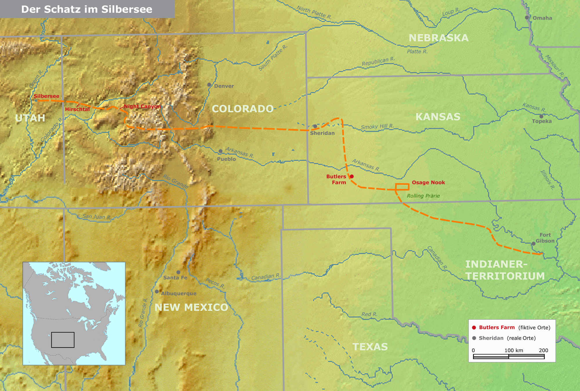 Route in Karl May's novel "Der Schatz im Silbersee"